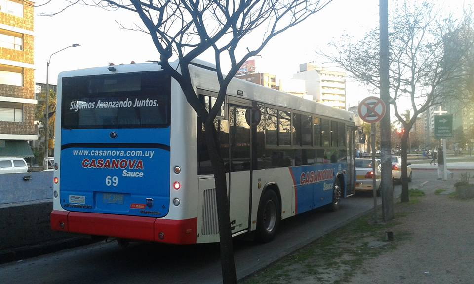 Yutong Bus Casanova Uruguay